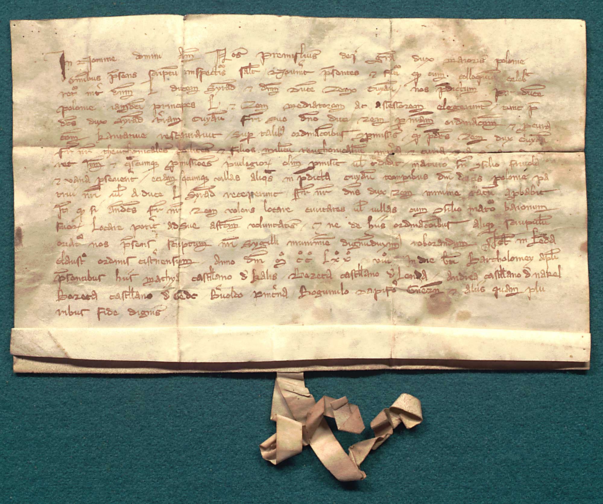 Przemysł II, ks. wielkopolski, pośrednicząc między Leszkiem, ks. sieradzkim, a Siemomysłem, ks. kujawskim, przyznaje Siemomysłowi zwrot Kujaw. Język: łac. Opis zewnętrzny: oryg., 1 k. pergaminowa, 13,2 x 21,2 + 3 cm; pasek od pieczęci